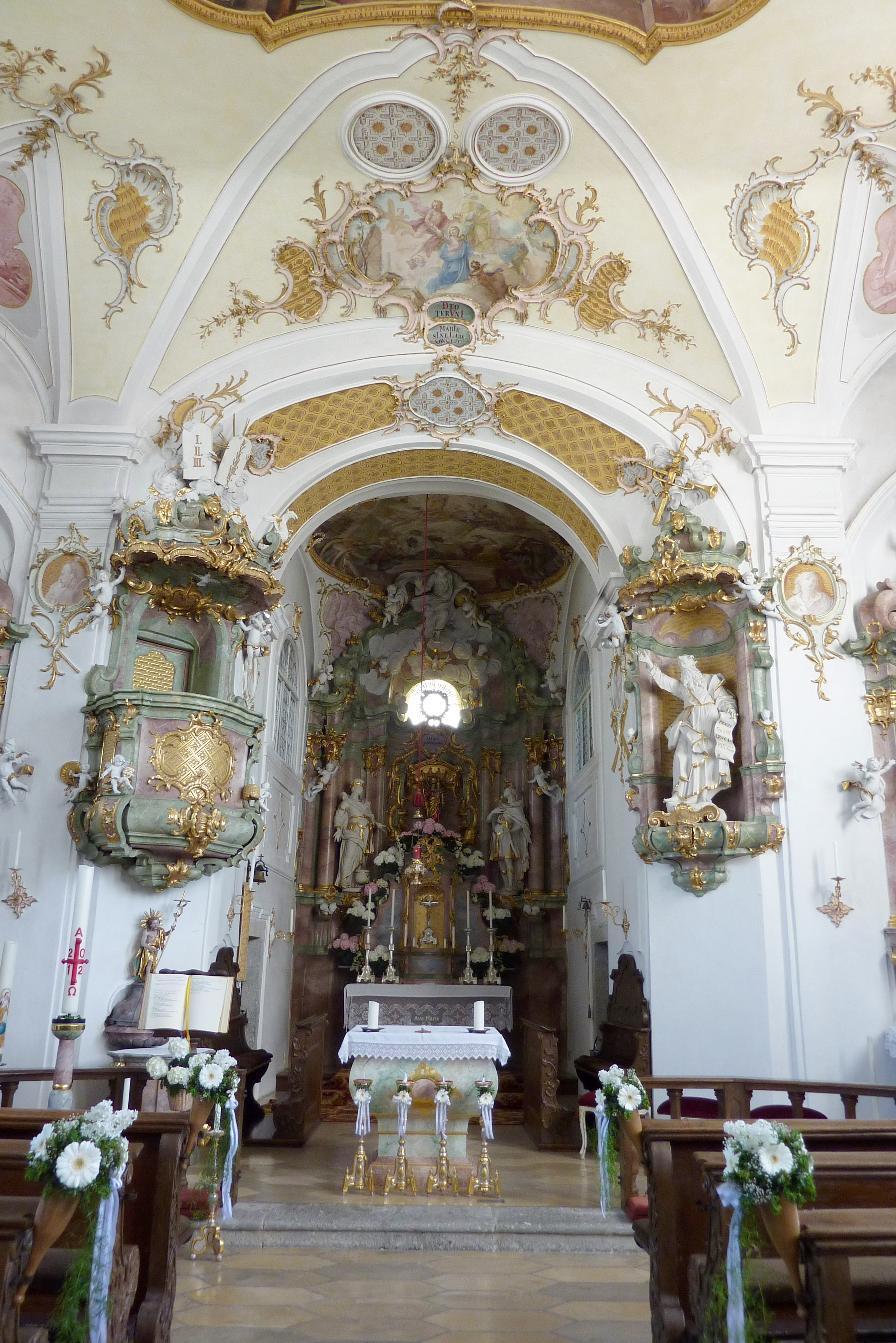 Katholische Pfarrkirche Maria Immaculata in Schwennenbach, einem Stadtteil von Höchstädt an der Donau im Landkreis Dillingen an der Donau (Bayern), Innenraum